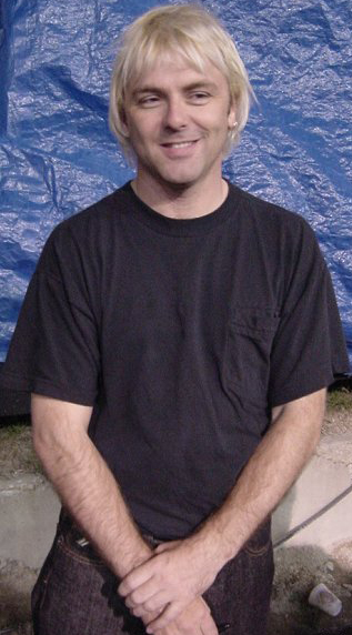 Mike Turner on September 10, 2001